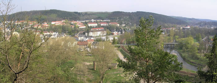 Blick auf die Stadt aus nördlicher Richtung